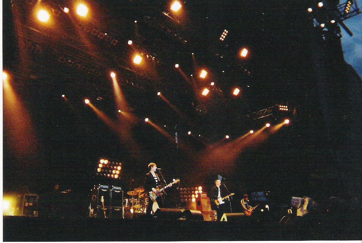 Travis @ Rock am Ring 2007, Nürburgring (Eifel)